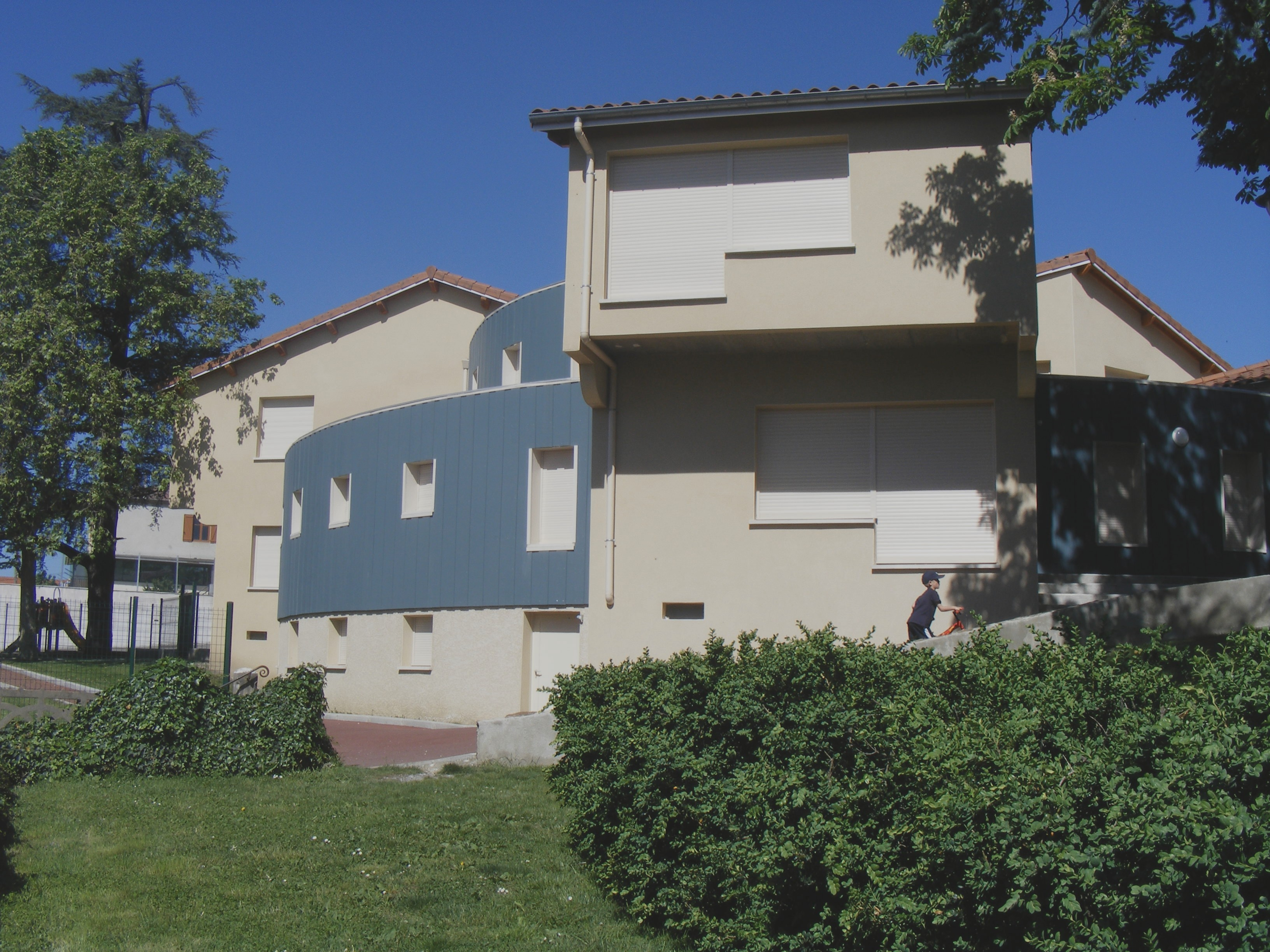 Ecole maternelle publique (ouverture 2007)